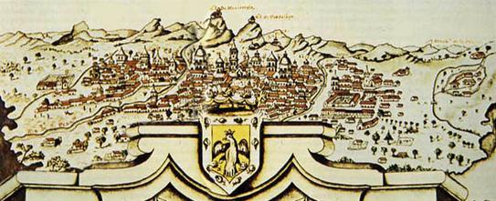 Vista panorámica de la ciudad de Santafé de Bogotá (detalle), realizada por J. Aparicio Morato en 1772. El original se destruyó en el incendio del 9 de abril de 1948. Esta reproducción es obra del ingeniero Daniel Ortega Ricaurte. Cabe anotar que desde el siglo XVII la traza de la ciudad permaneció casi invariable.